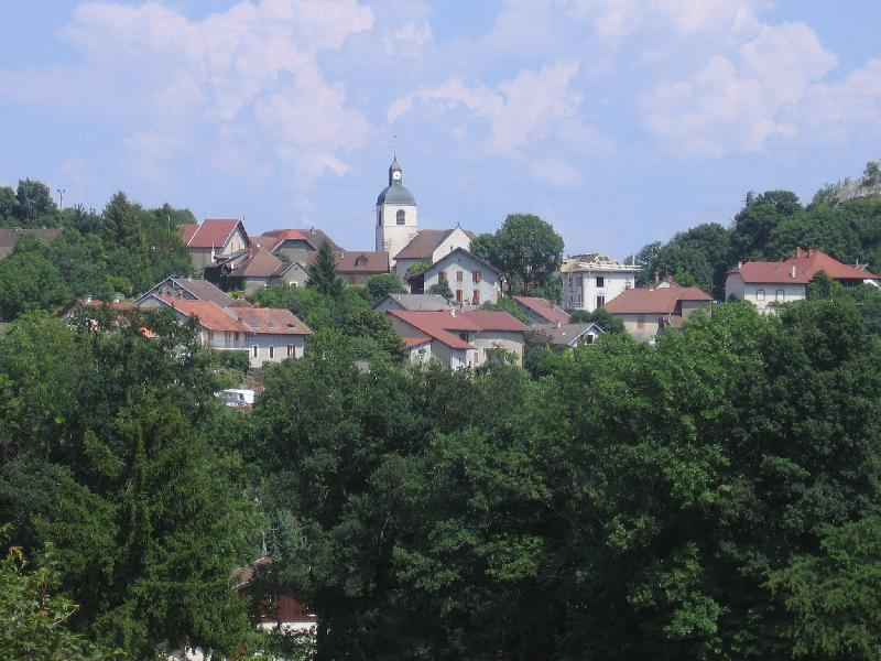 Vue du village de Chaumont, Haute-Savoie